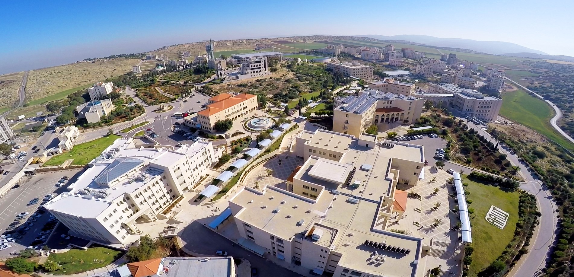 حرم الجامعة - جنين